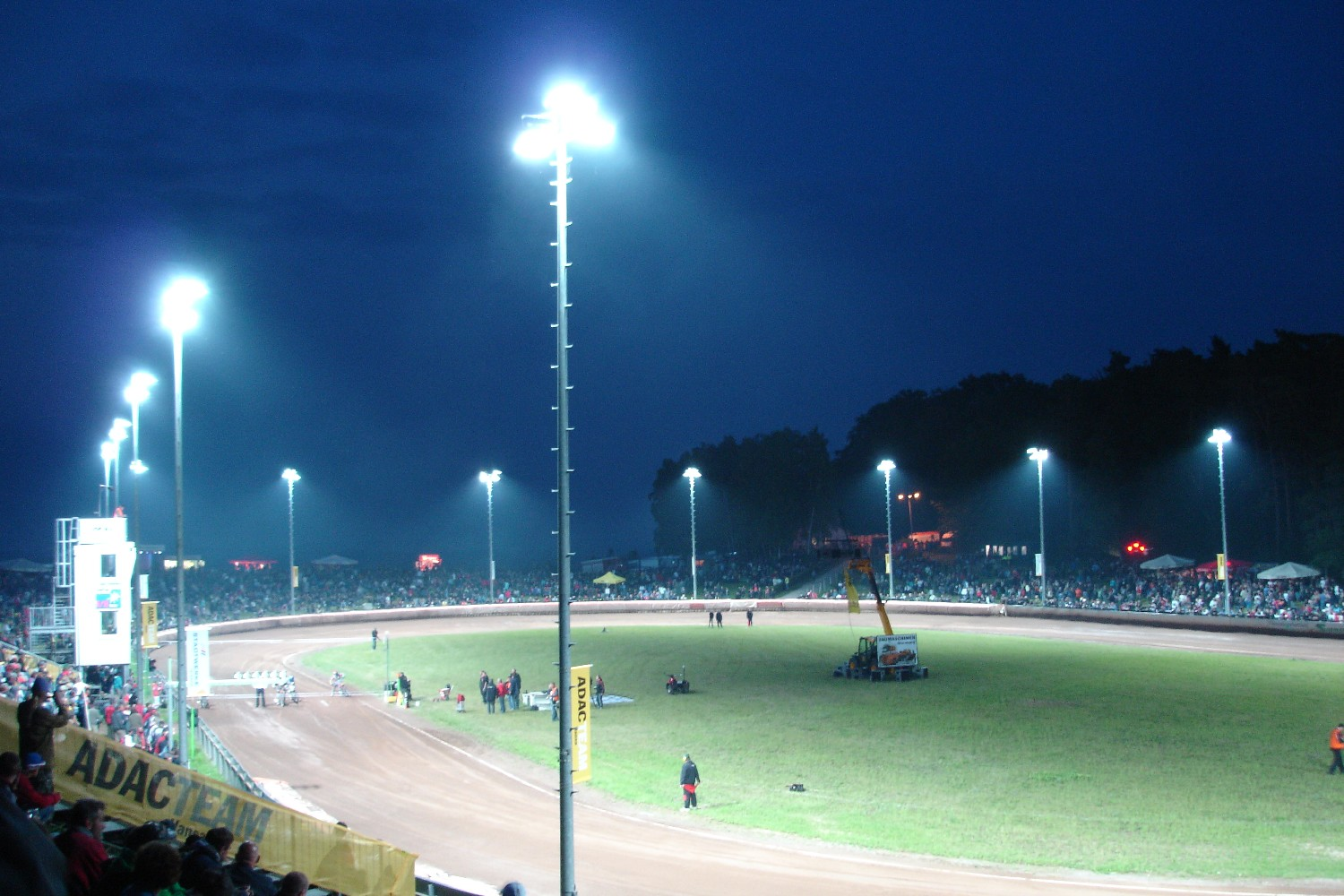 Flutlichtanlage in der Bergring-Arena in Teterow, Deutschland.